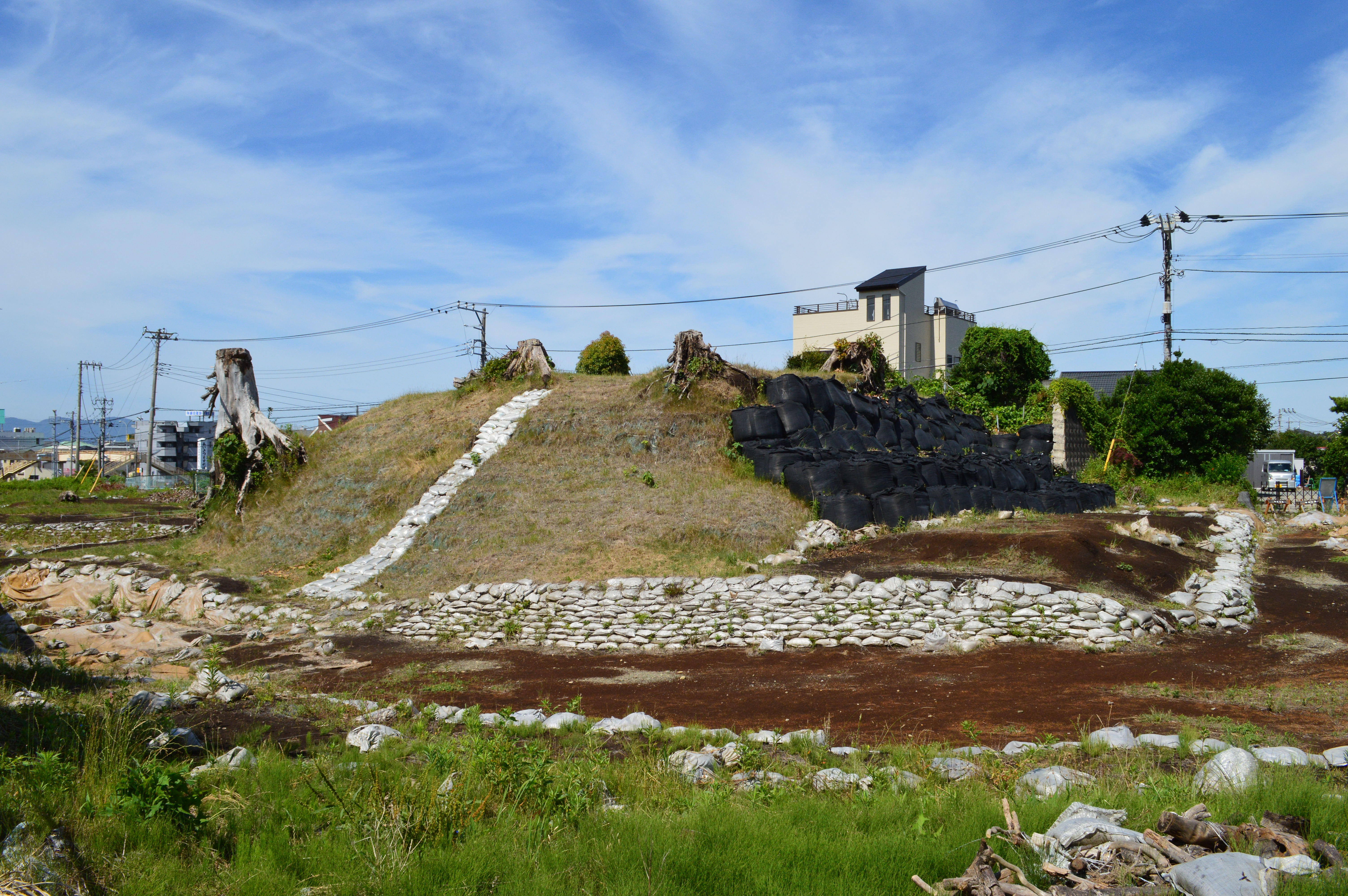 高尾山古墳 (沼津市) 後円部 後方部 ファイル名のkouenbu (後円部) は誤りです。